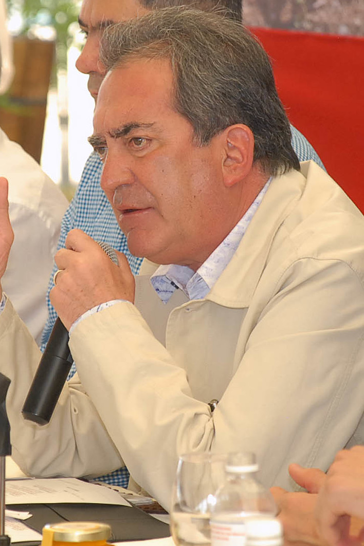 El Gobernador del Estado, Carlos Lozano de la Torre, al encabezar la reunión del Comité Directivo del Consejo Nacional Agropecuario